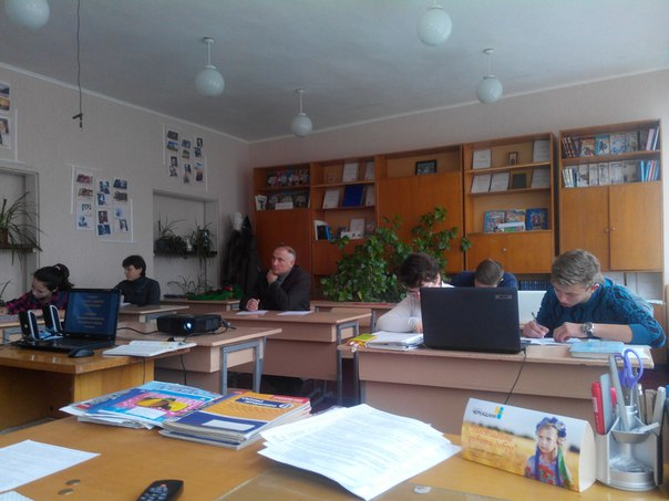 Вікі-урок в 11 класі Шендерівського НВК Корсунь-Шевченківського району Черкаської обл